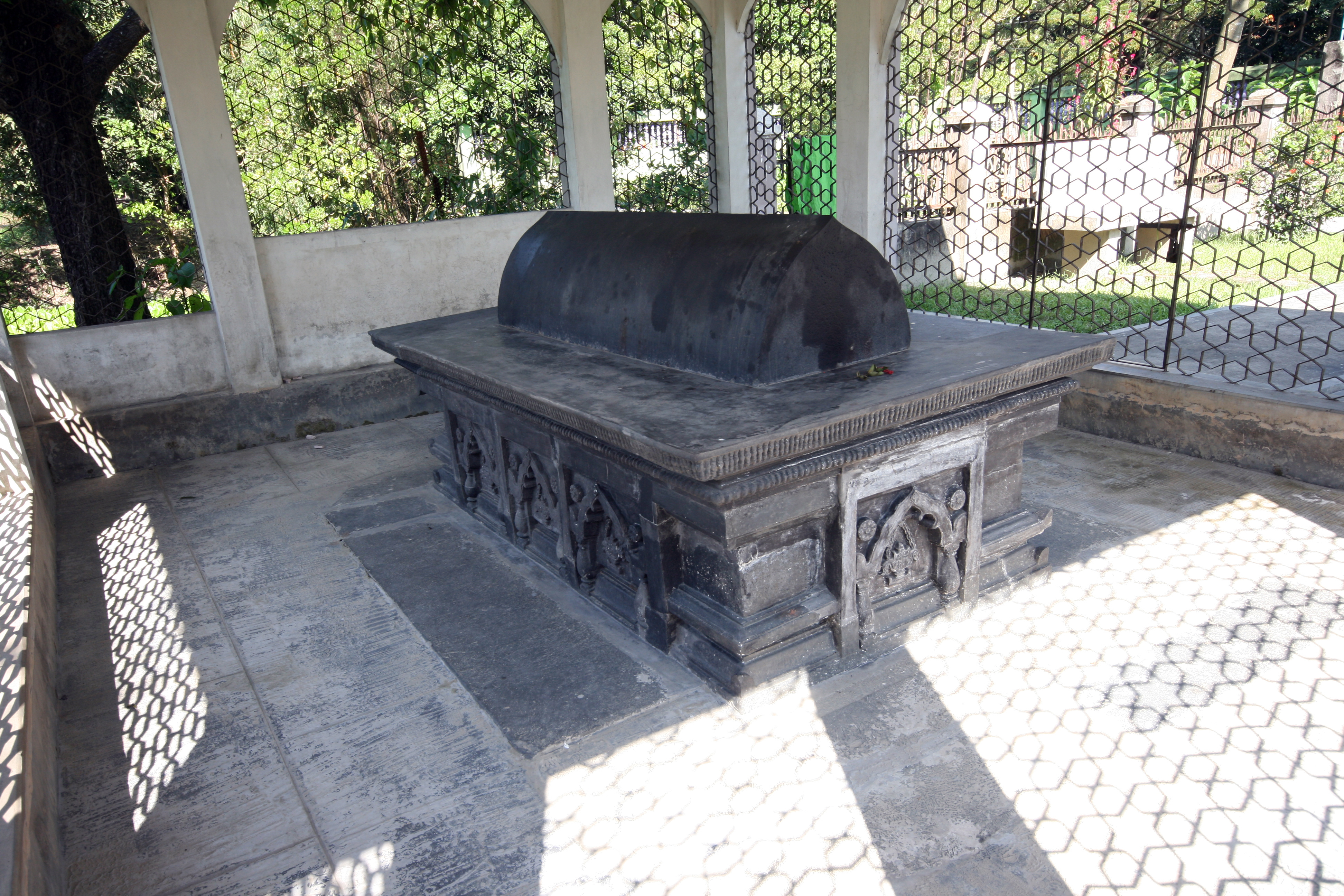 গিয়াসউদ্দিন আজম শাহের মাজার